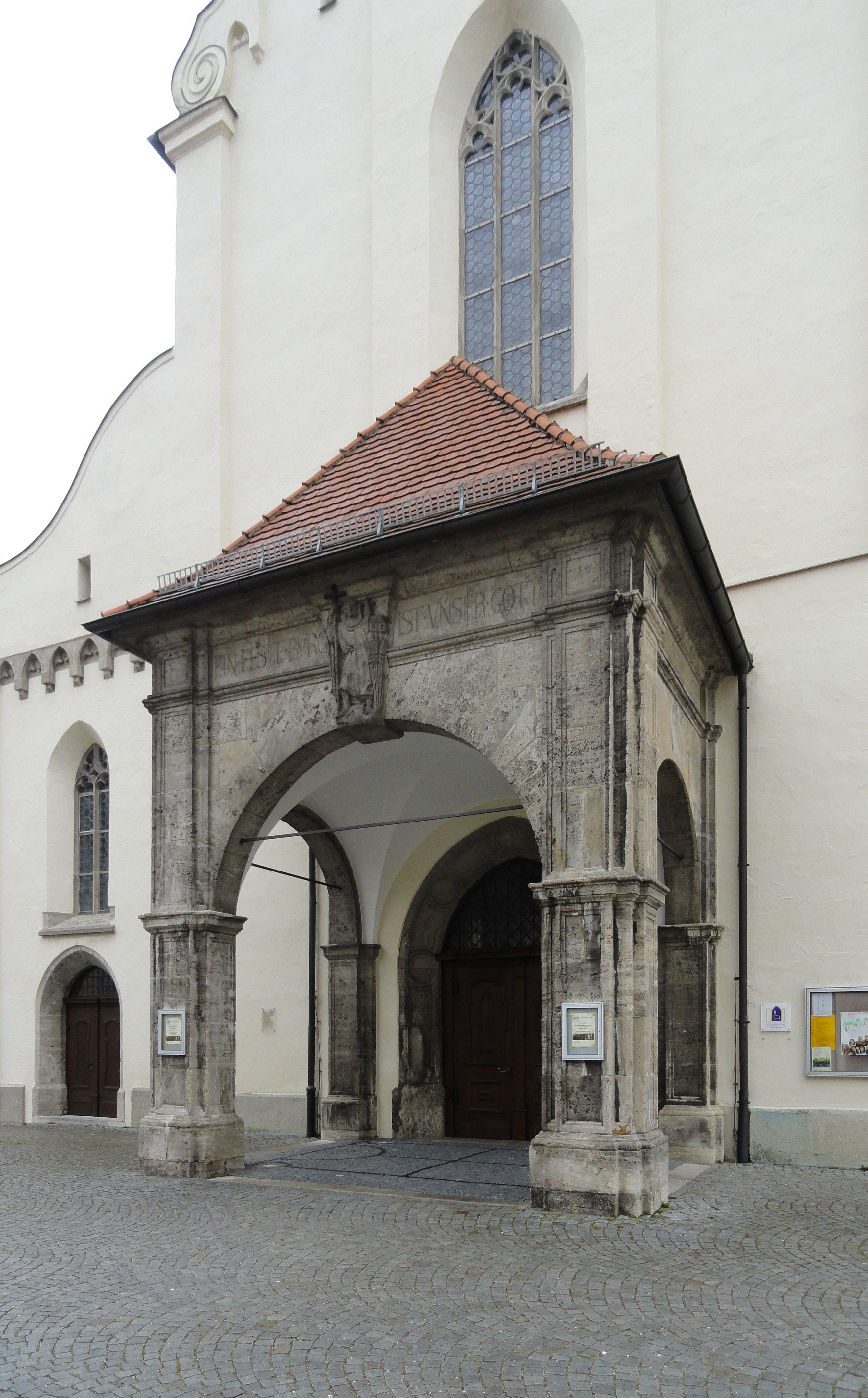 Vorzeichen der St. Mang-Kirche in Kempten